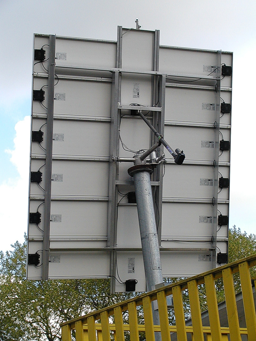 Solarpanel